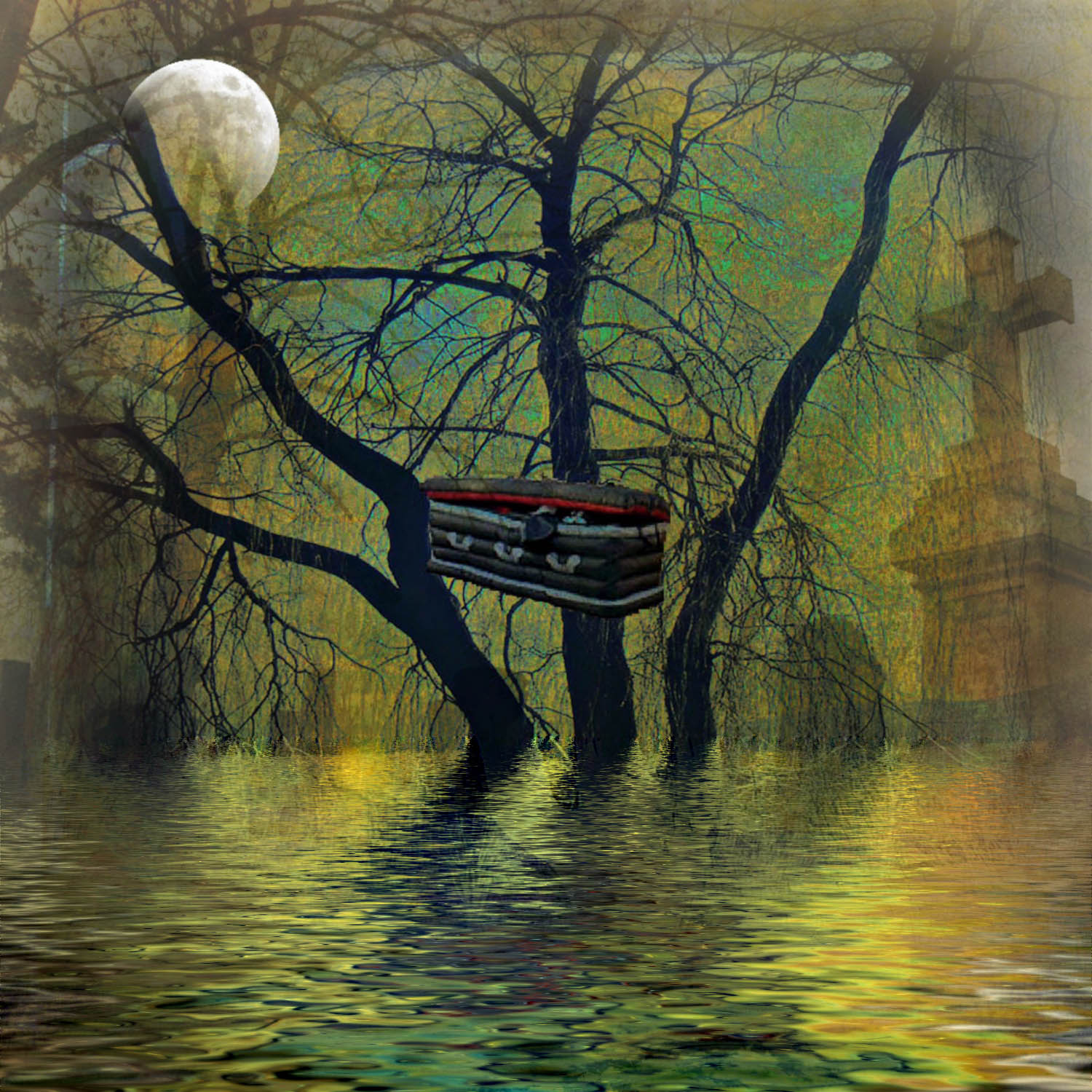 Dibujo de un ataúd arrastrado por el agua